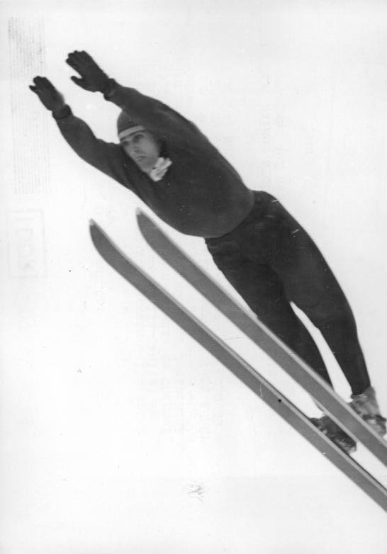 Zentralbild Kohls 13.1.1963 Helmut Recknagel siegte auf der Thüringen-Schanze Bei herrlichem Winterwetter gewann Weltmeister Helmut Recknagel (SC Motor Zella-Mehlis) am 13.1.1963 auf der Thüringen-Schanze in Oberhof den ersten Sprunglauf der Thüringer Dreischanzentournee. Mit der Note 231,75 für Sprünge von 68 und 69 m verwies er seine Klubkameraden Veit Kührt (228,65 -69-69) und Karl-Heinz Munk (218,80 - 68-65,5) auf die Plätze. UBz: Helmut Recknagel während des Trainingsspringens auf der Thüringen-Schanze am 12.1.63.